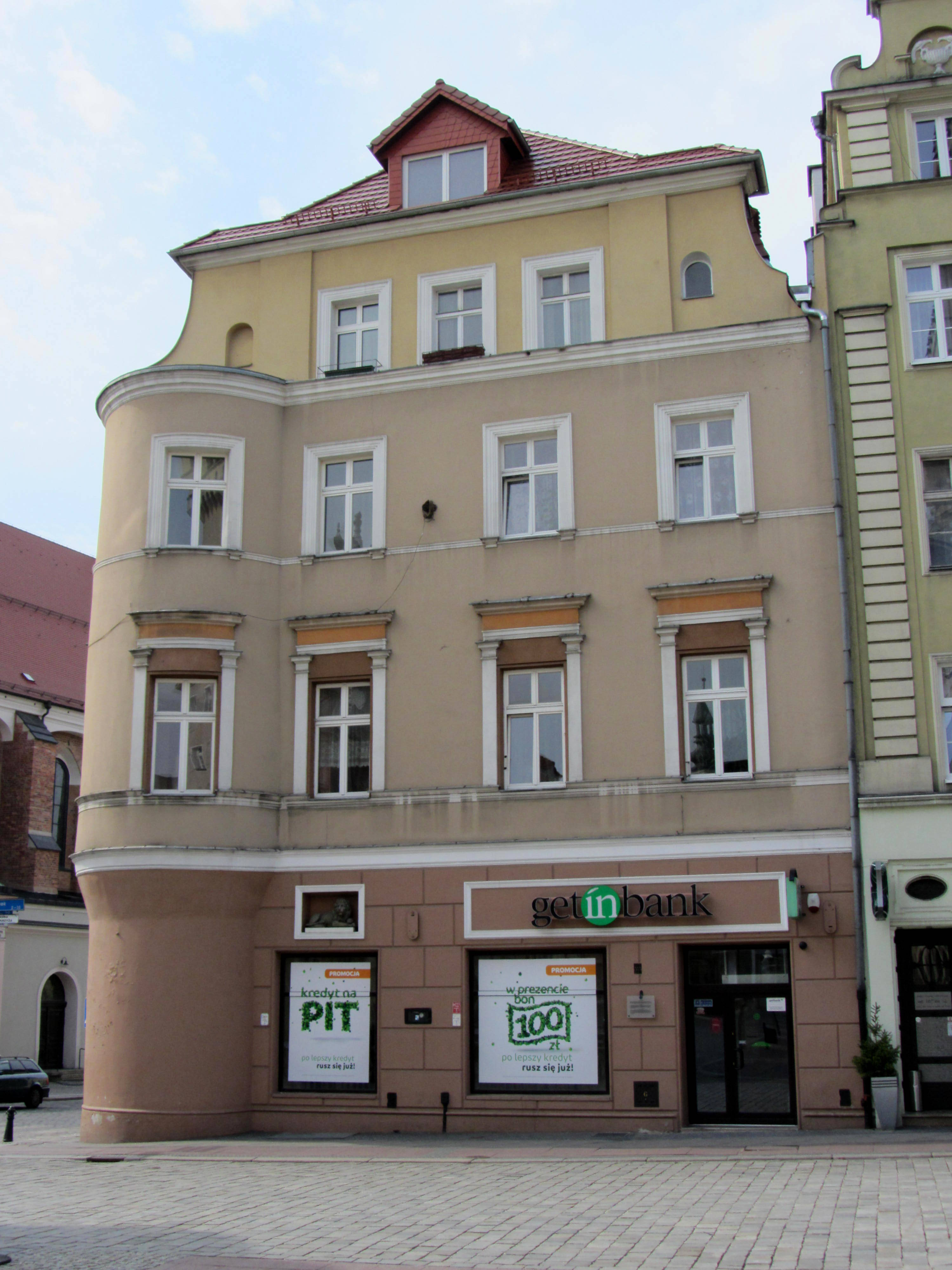 Das Fürstenhaus in Oppeln am Ring